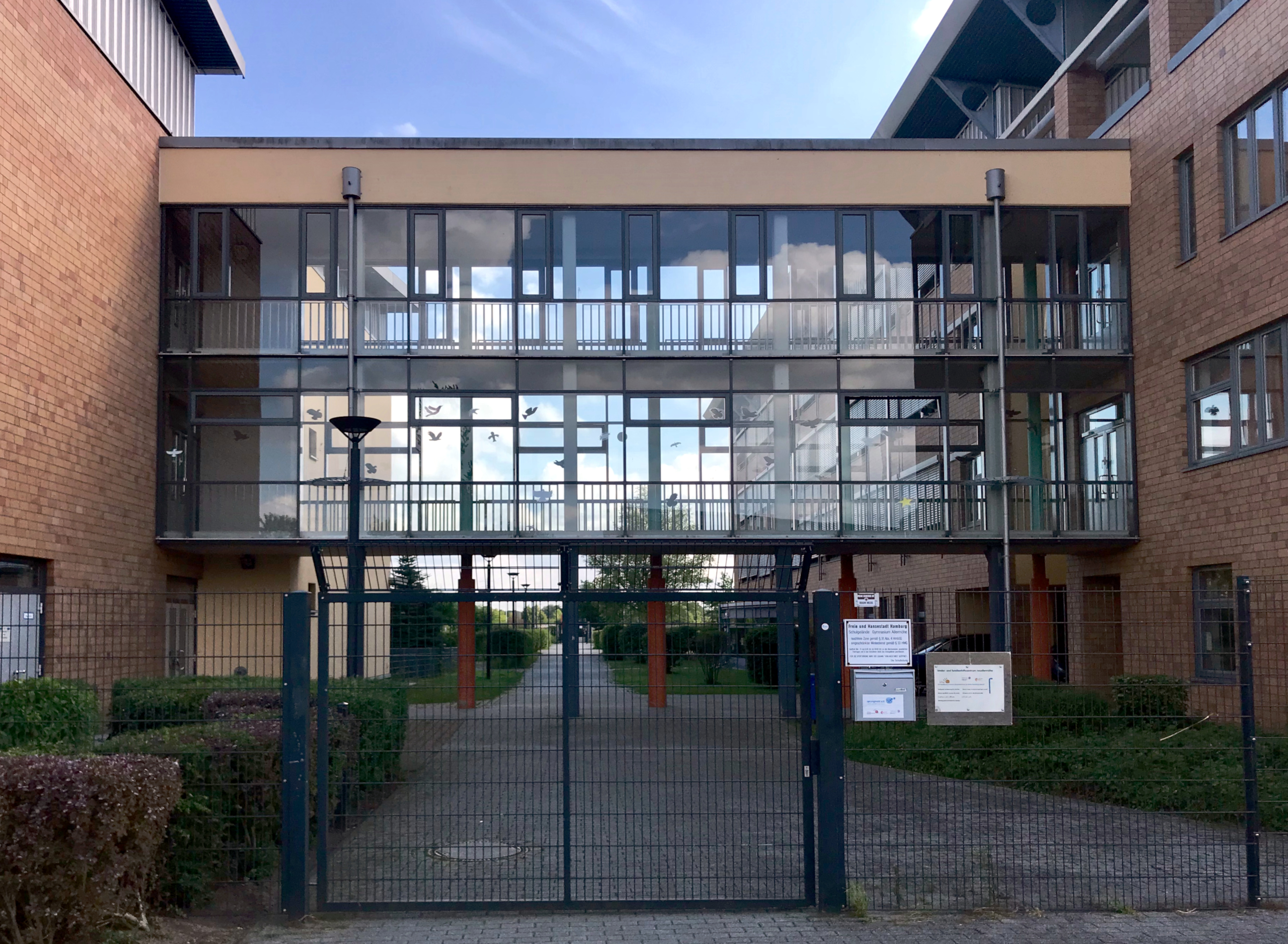 Übergang zwischen zwei Gebäuden des Gymnasiums Allermöhe, vom Park "Grüne Mitte" aus gesehen